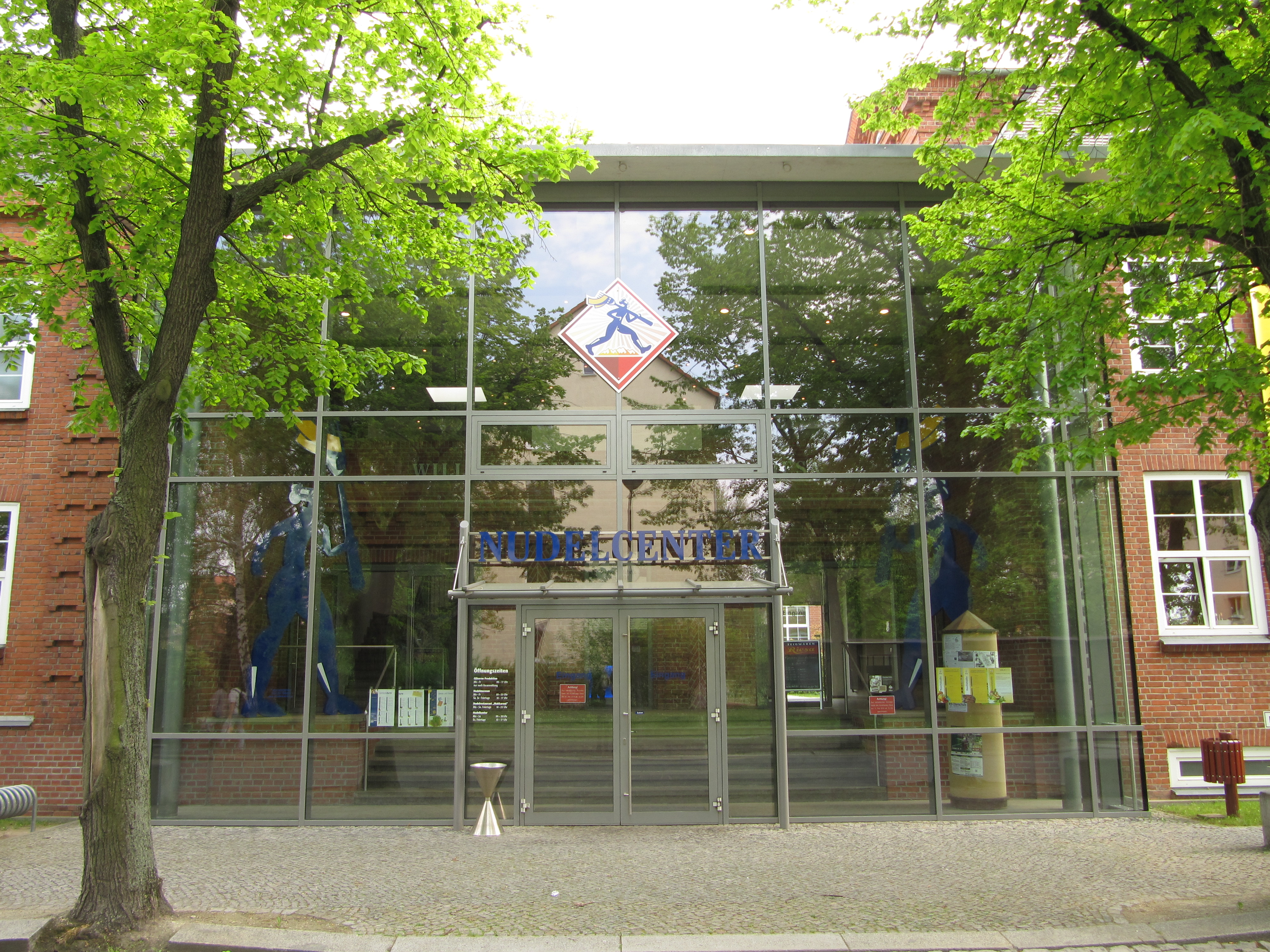 Das 2003 eröffnete Nudelcenter der Teigwaren Riesa GmbH.